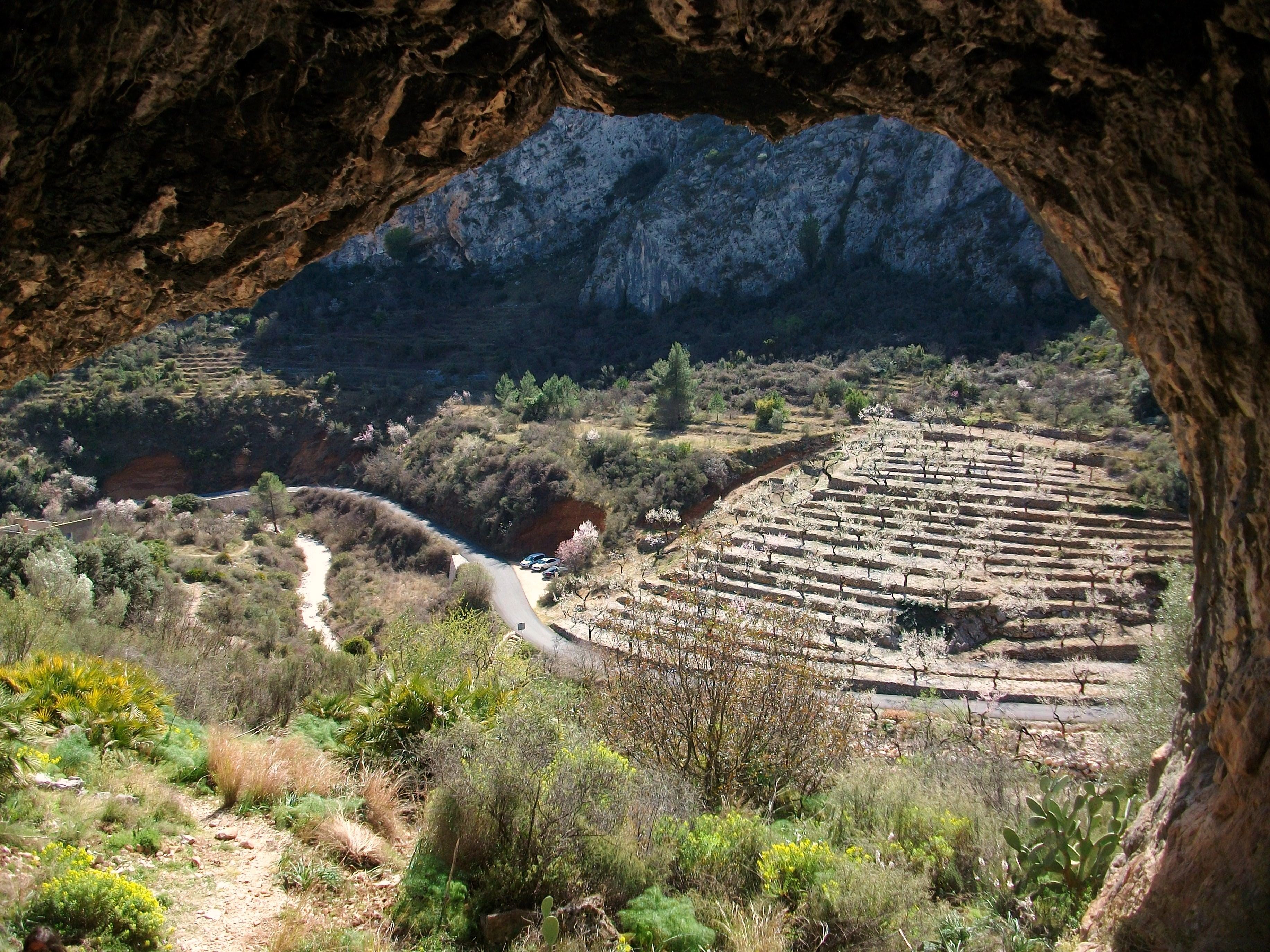 El pla de Petracos des de l'interior de la cova.